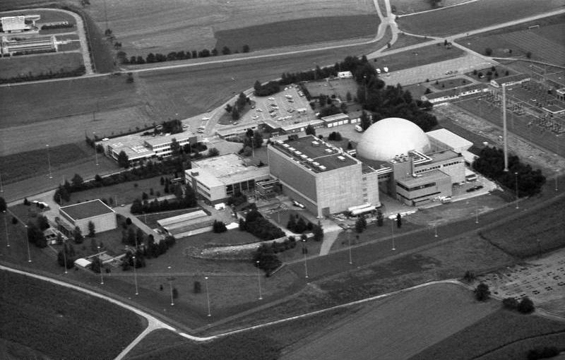 Rhein-Bodensee-Bereisung des Rates von Sachverständigen für Umweltfragen und des Bundesministeriums des Inneren.